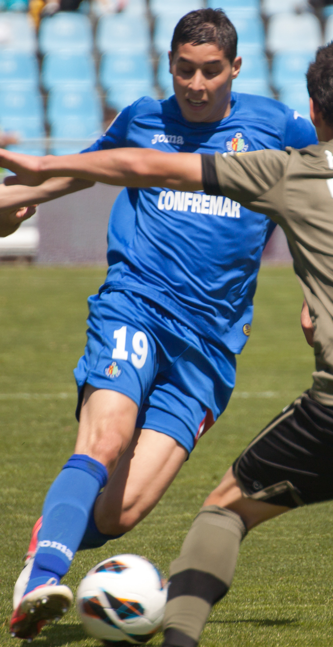 Abdelaziz Barrada (Provins, Francia, 19 de junio de 1989), futbolista nacido en Francia, internacional marroquí. Juega de centrocampista ofensivo. Partido celebrado el 21-04-2013 entre el Getafe C.F. - R.C.D. Español correspondiente a La Liga.